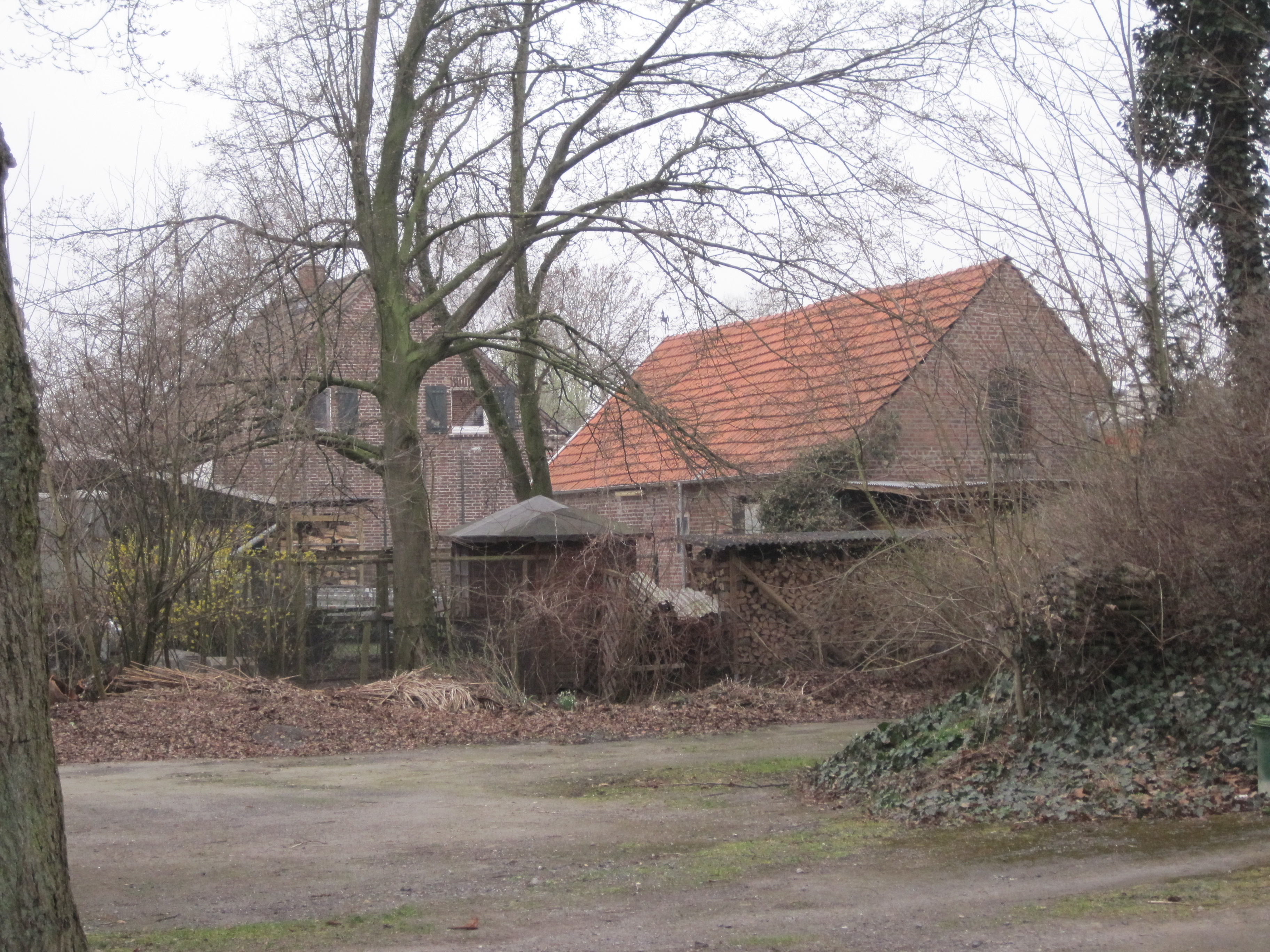 Das Foto zeigt die Gebäude des Klosterhofs in Hamm-Bockum-Hövel.